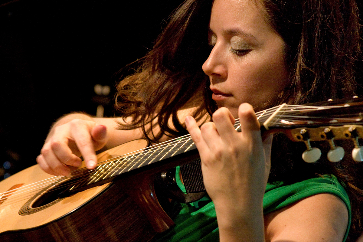 Cecilia Zabala